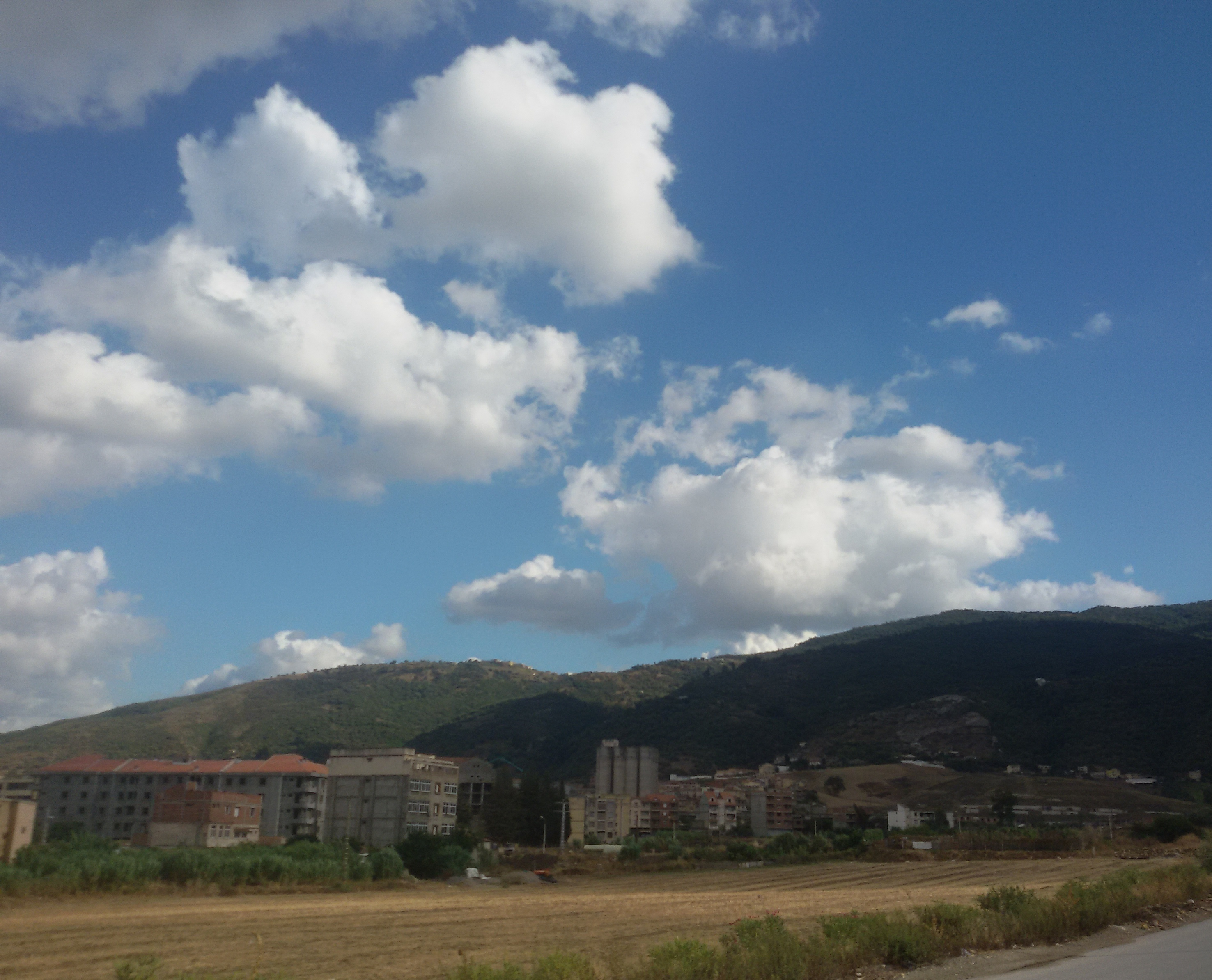 Vue sur l'unité de la SIMPAC et sur le mont Sidi Ali Bounab, à Tadmaït.